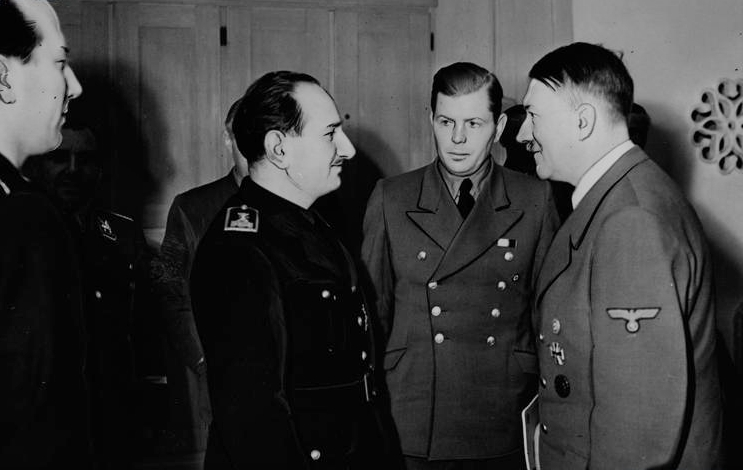 José Luis Arrese durante una reunión con el líder nazi, Adolf Hitler, en su cuartel general.